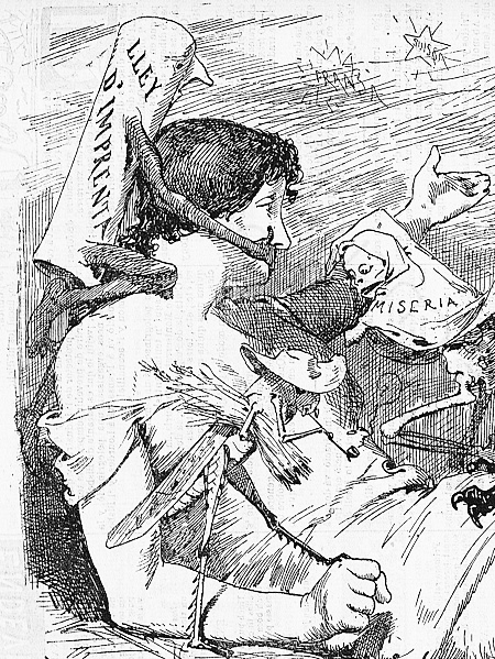 La situació d'Espanya.